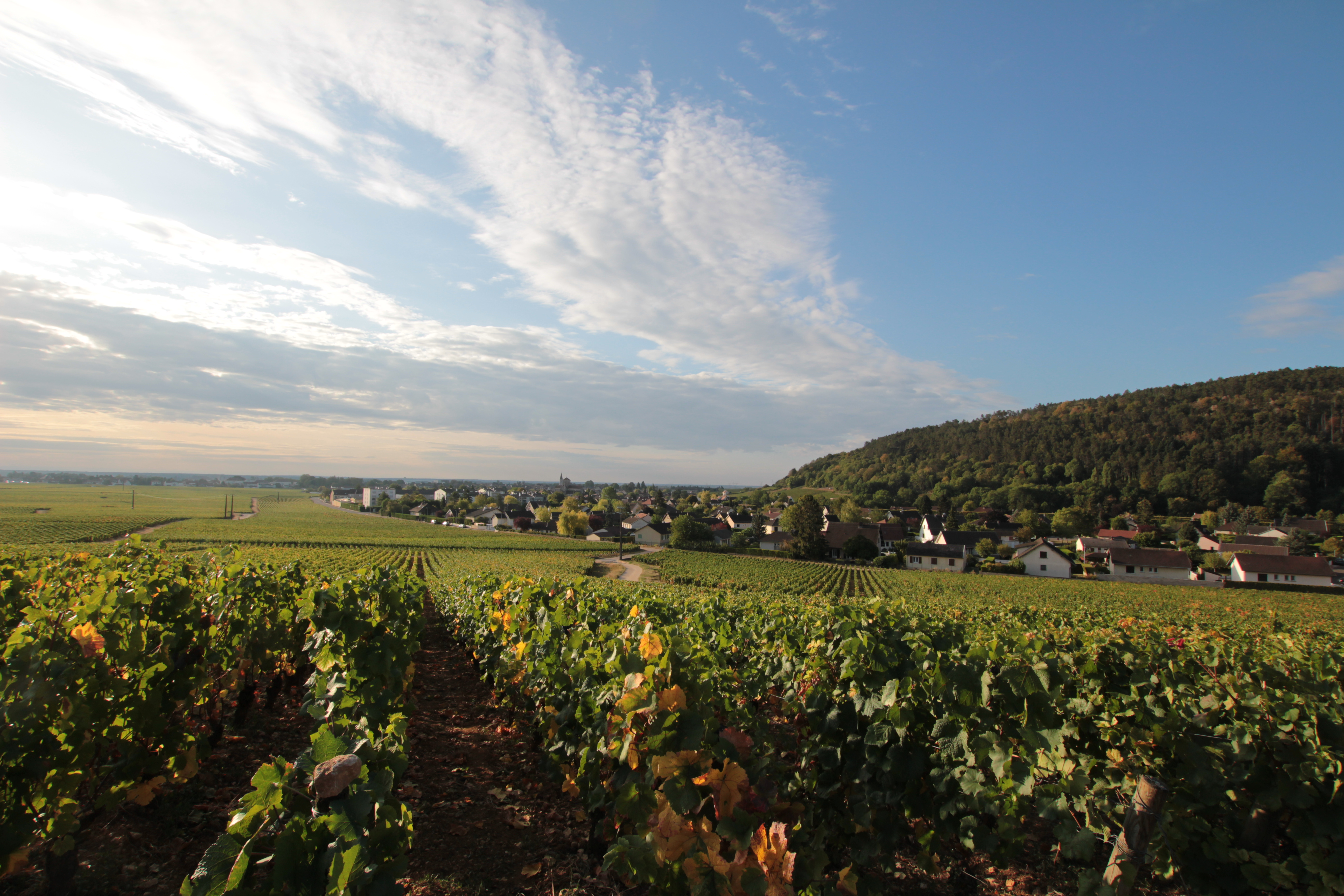 Nuits-Saint-Georges au matin.